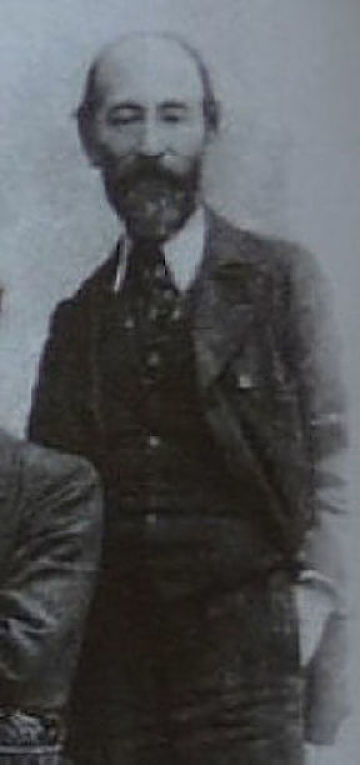 Varlam Cherkezishvili (détail de la photo de groupe )